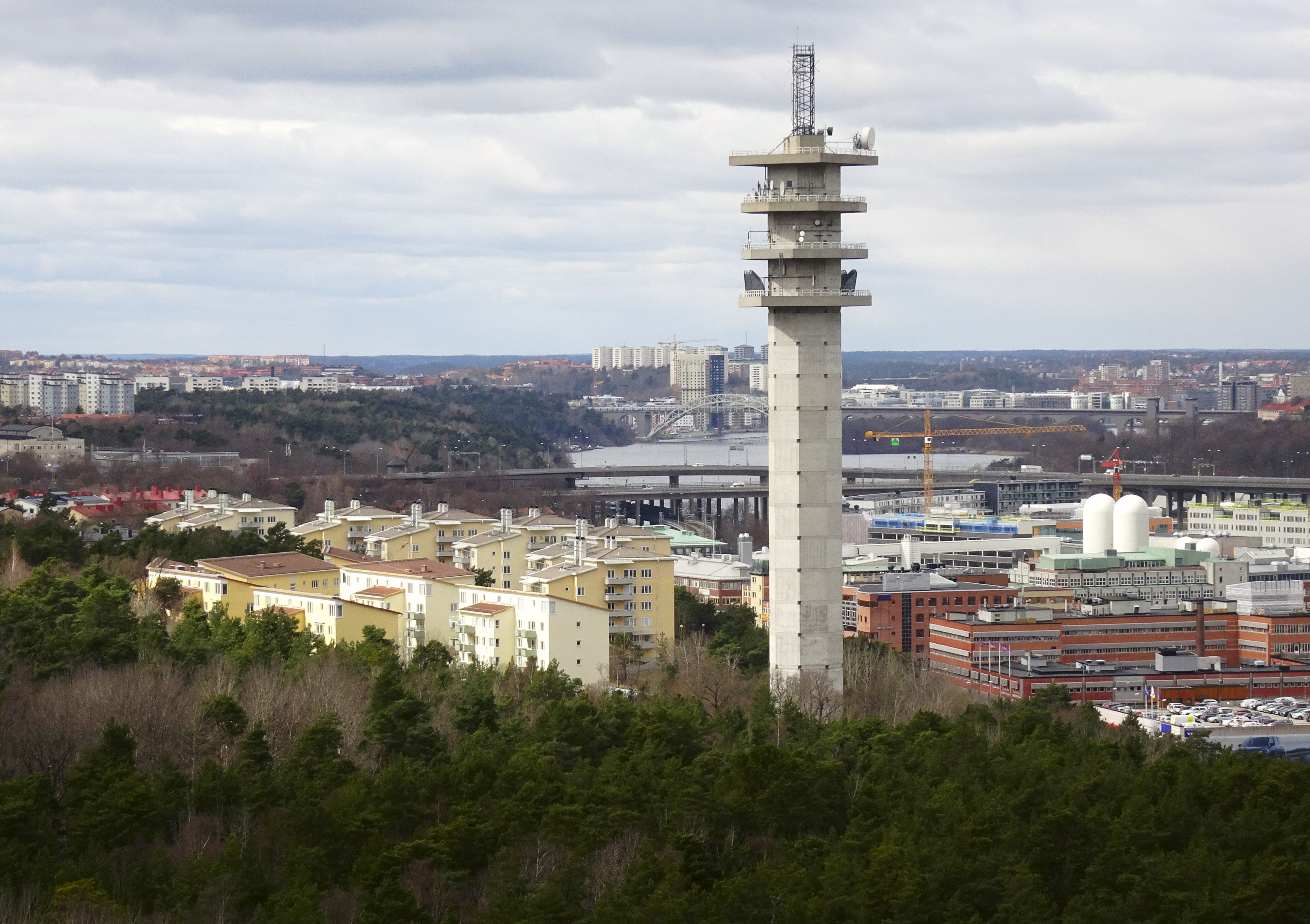 Hammarbytornet sett från Hammarbybacken/toppen